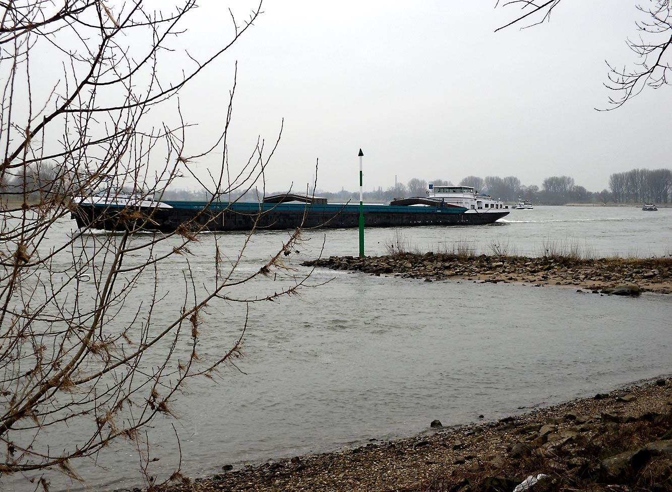 Rhein bei Ilverich